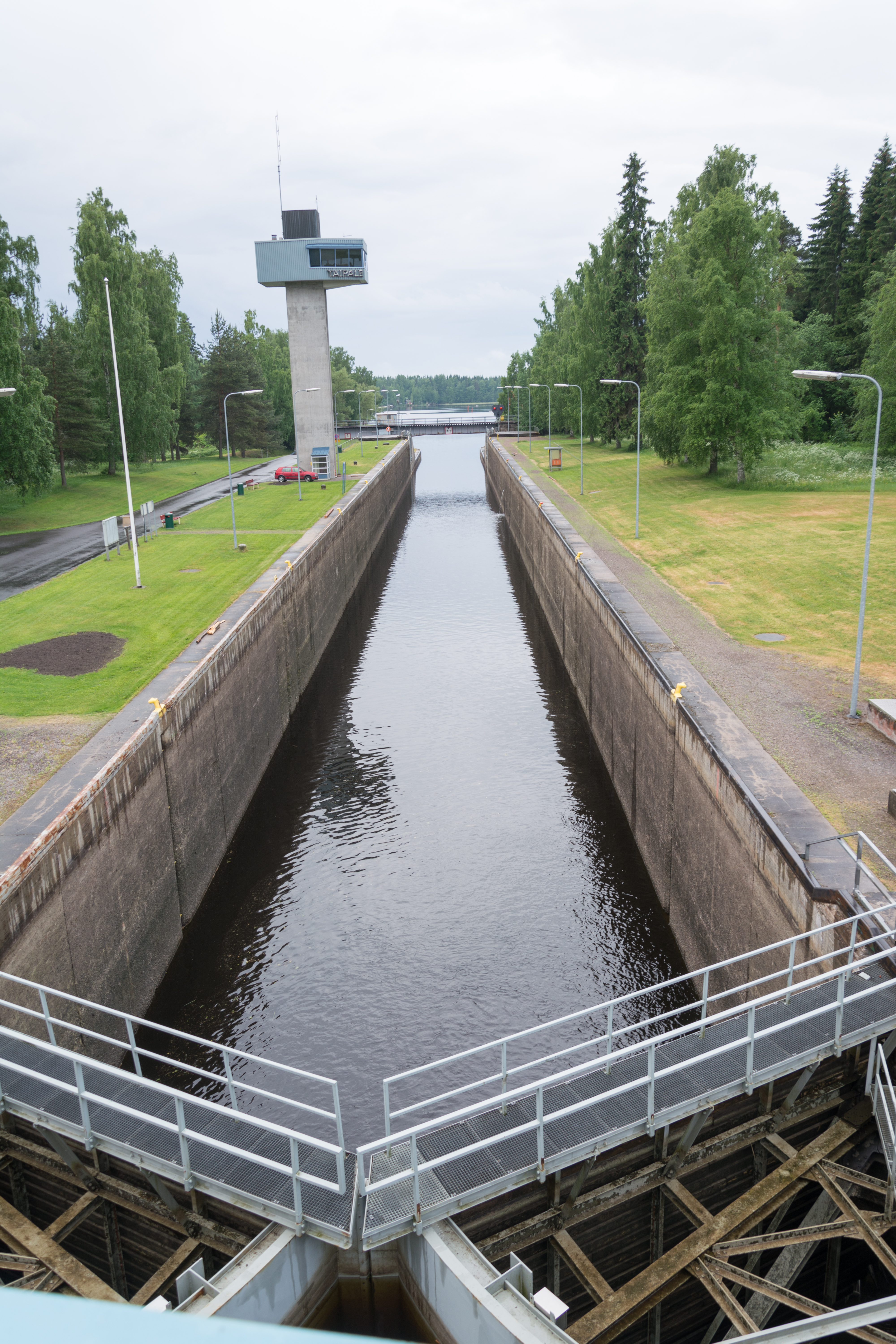 Taipaleen kanava Varkaudessa